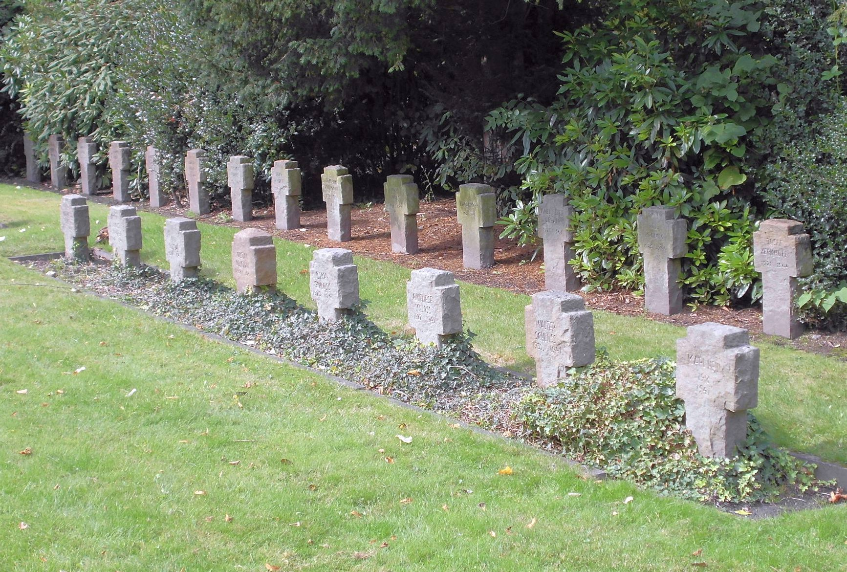 Kriegsgräberstätte Nordfriedhof Dortmund